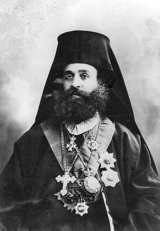 митрополит Герман (Каравангелис)